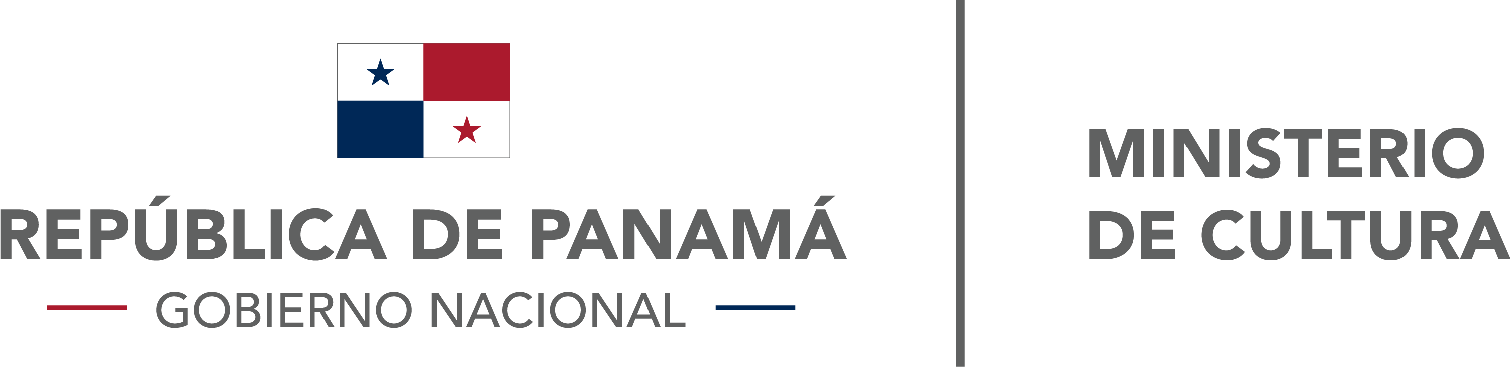 Logo del Ministerio de Cultura